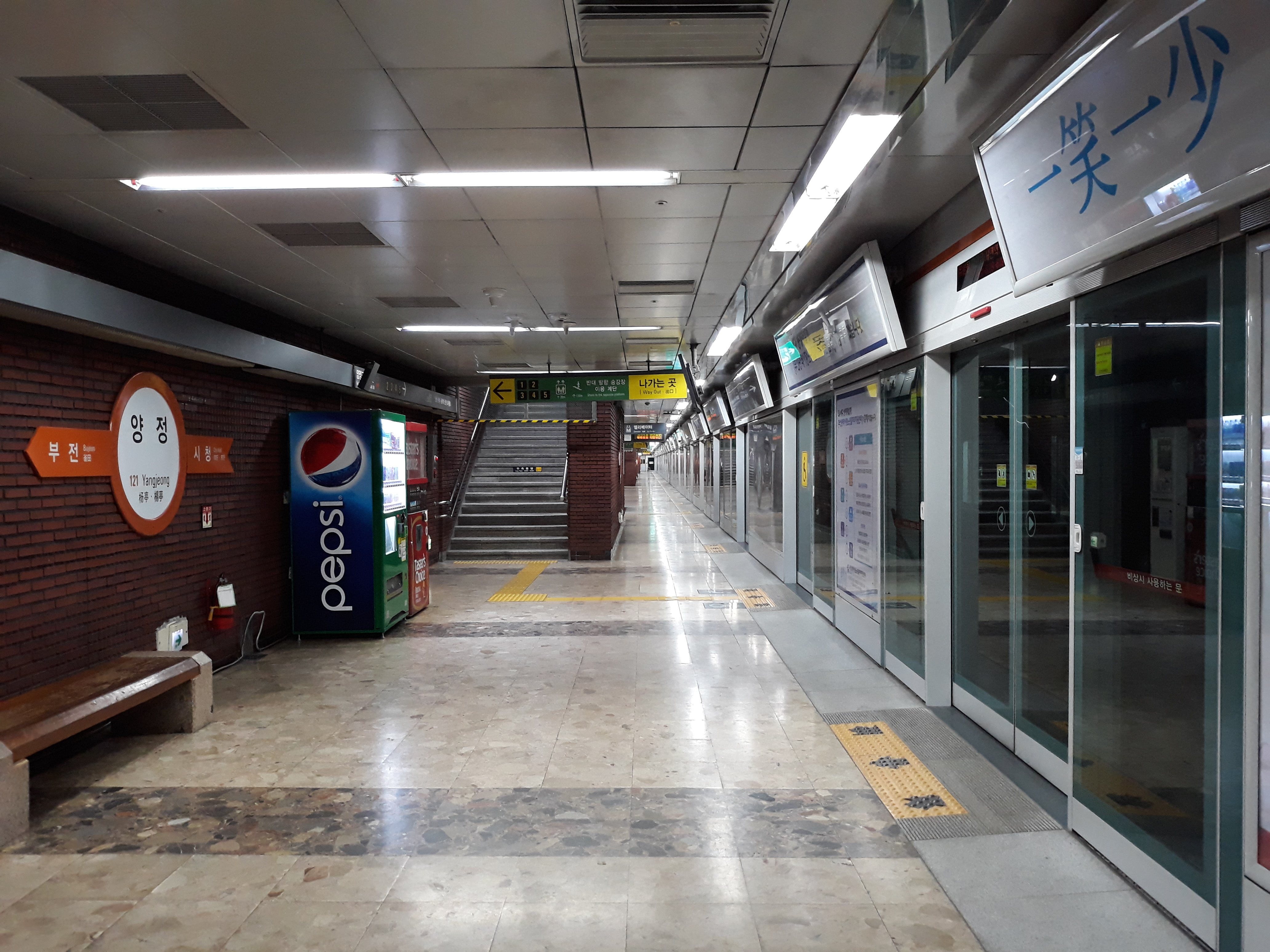 부산 도시철도 1호선 양정역 다대포해수욕장 방면 승강장